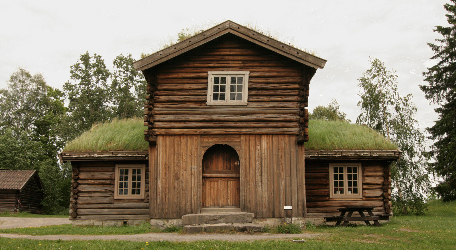 Barfrøstue fra Svestad, Stor-Elvdal. Barfrøet trolig oppført 1787, stua eldre. I dag på Hedmarksmuseet, Hamar.